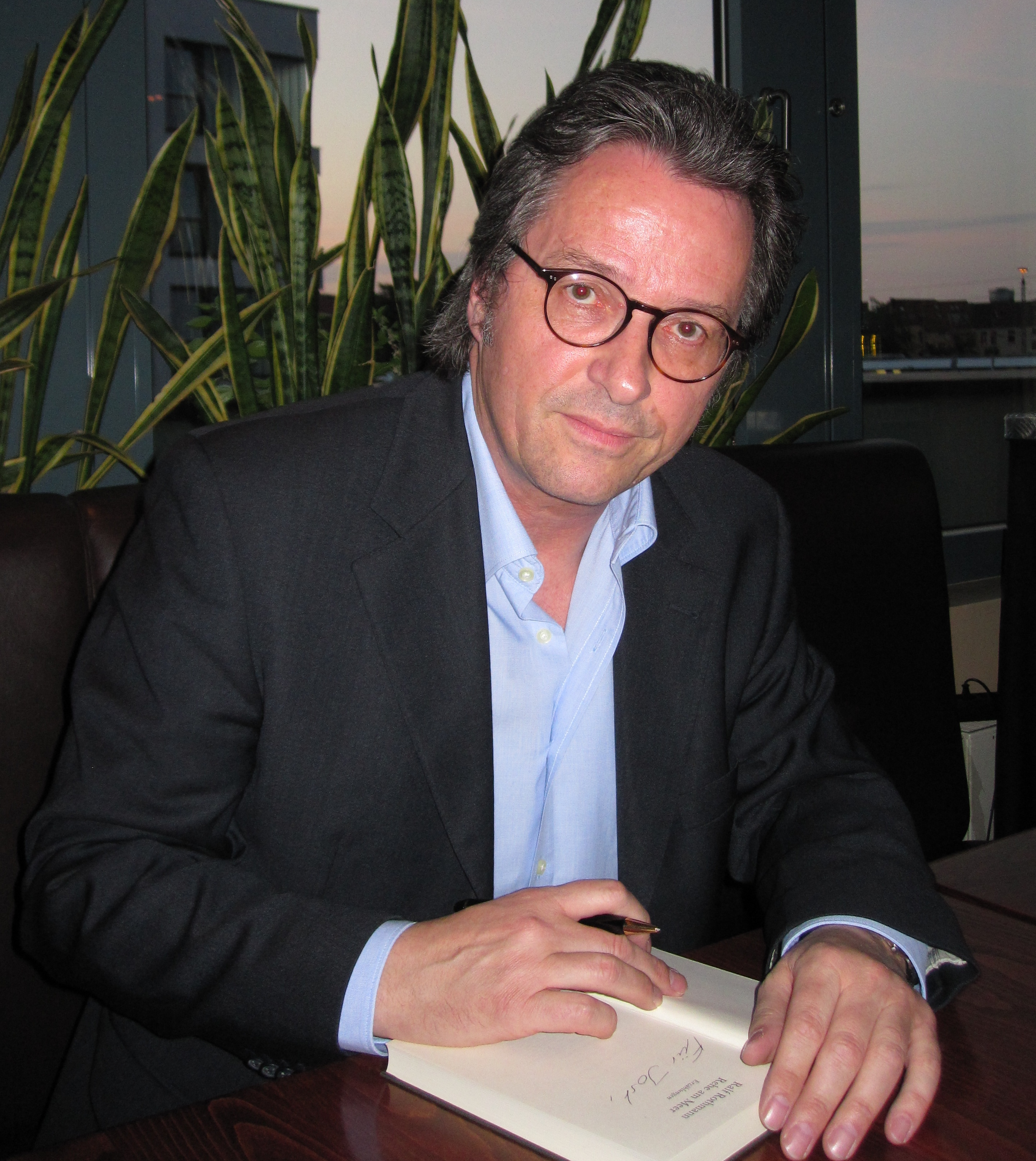 Ralf Rothmann bei einer Lesung in Osnabrück im Mai 2012